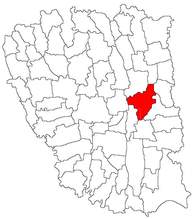 Categorie:Hărţi ale judeţului Galaţi